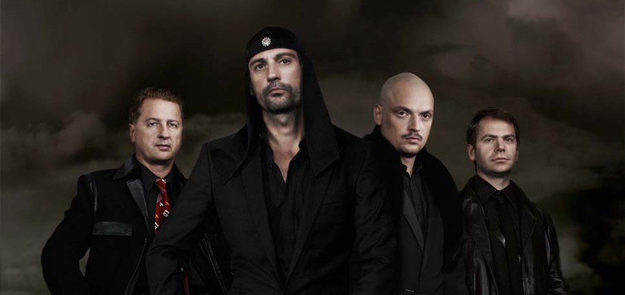 LAIBACH, Pressefoto 2006